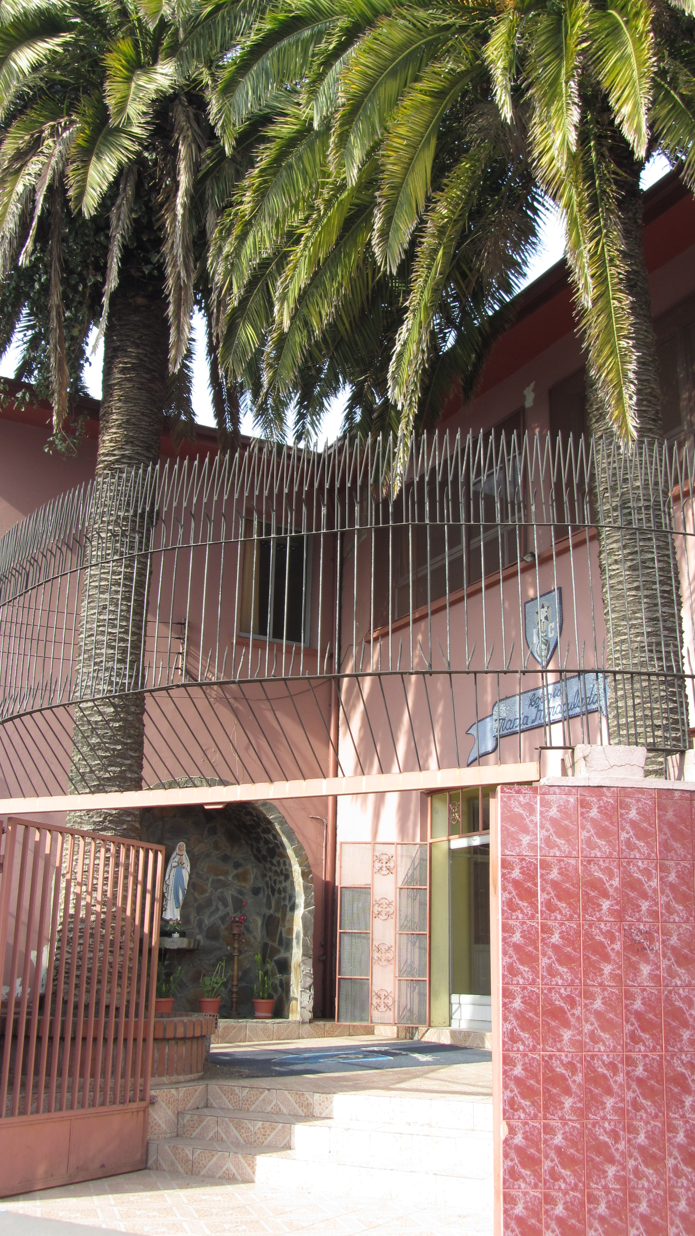 Entrada del colegio de niñas María Inmaculada, en una esquina de la Plaza Cruz, Concepción, Chile Septiembre de 2012